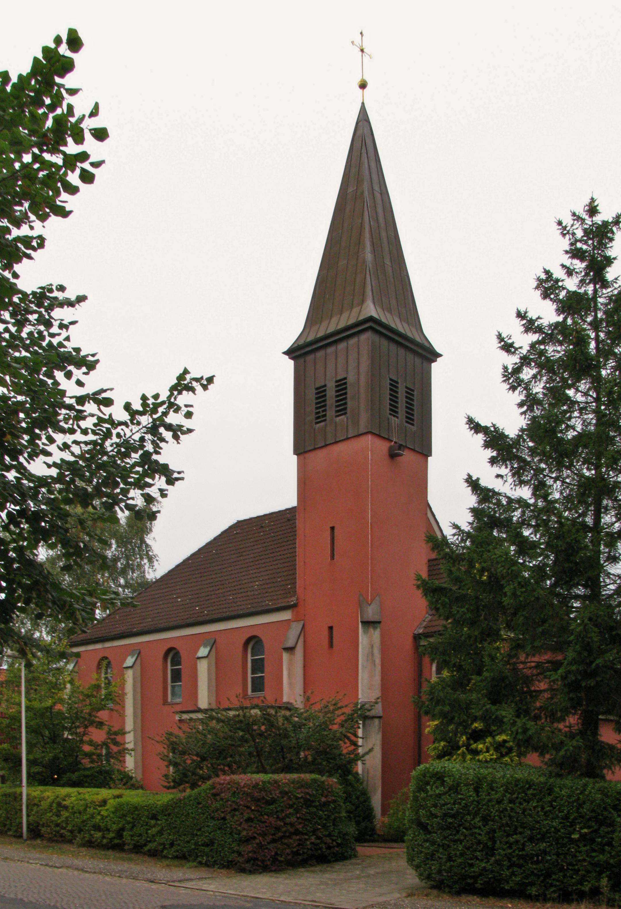 Katholische Kirche St. Ansgar in Hemmoor